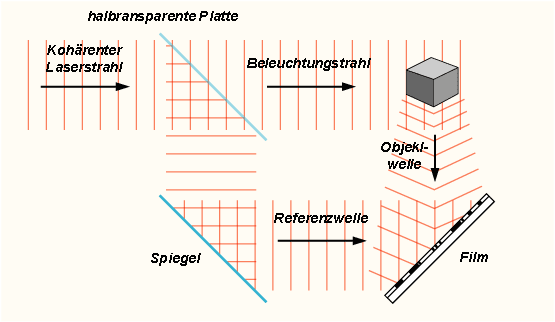 Diagramm des holographischen Aufzeichnungsprozesses